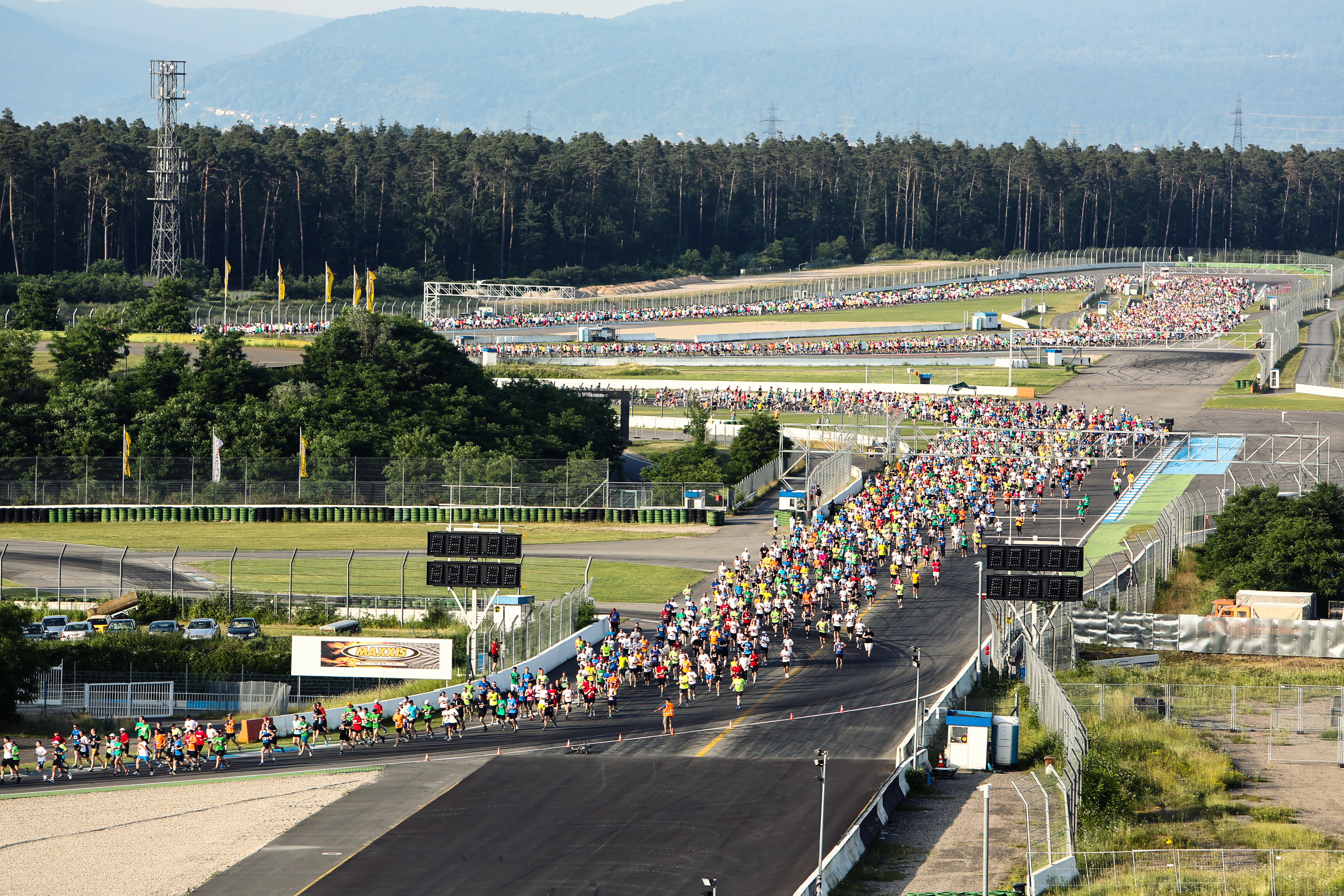 Firmencup-Läufer auf dem Hockenheimring 2013